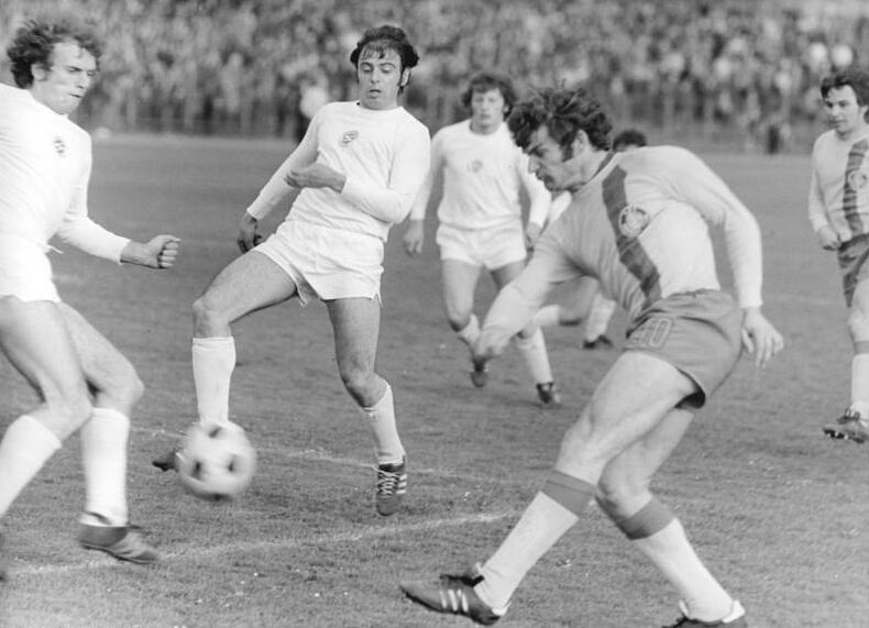 ADN-ZB-Kluge 28.4.76 Leipzig: Fußball-Oberliga 1.FC Lok Leipzig -BSG Sachsenring Zwickau 2: 1-Vorbei an den Zwickauer Abwehrspielern Roland Stemmler (l.) und Andreas Reichelt (m.) schießt FCL-Außenstürmer Wolfram Löwe (r.) auf das Sachsenring-Tor.